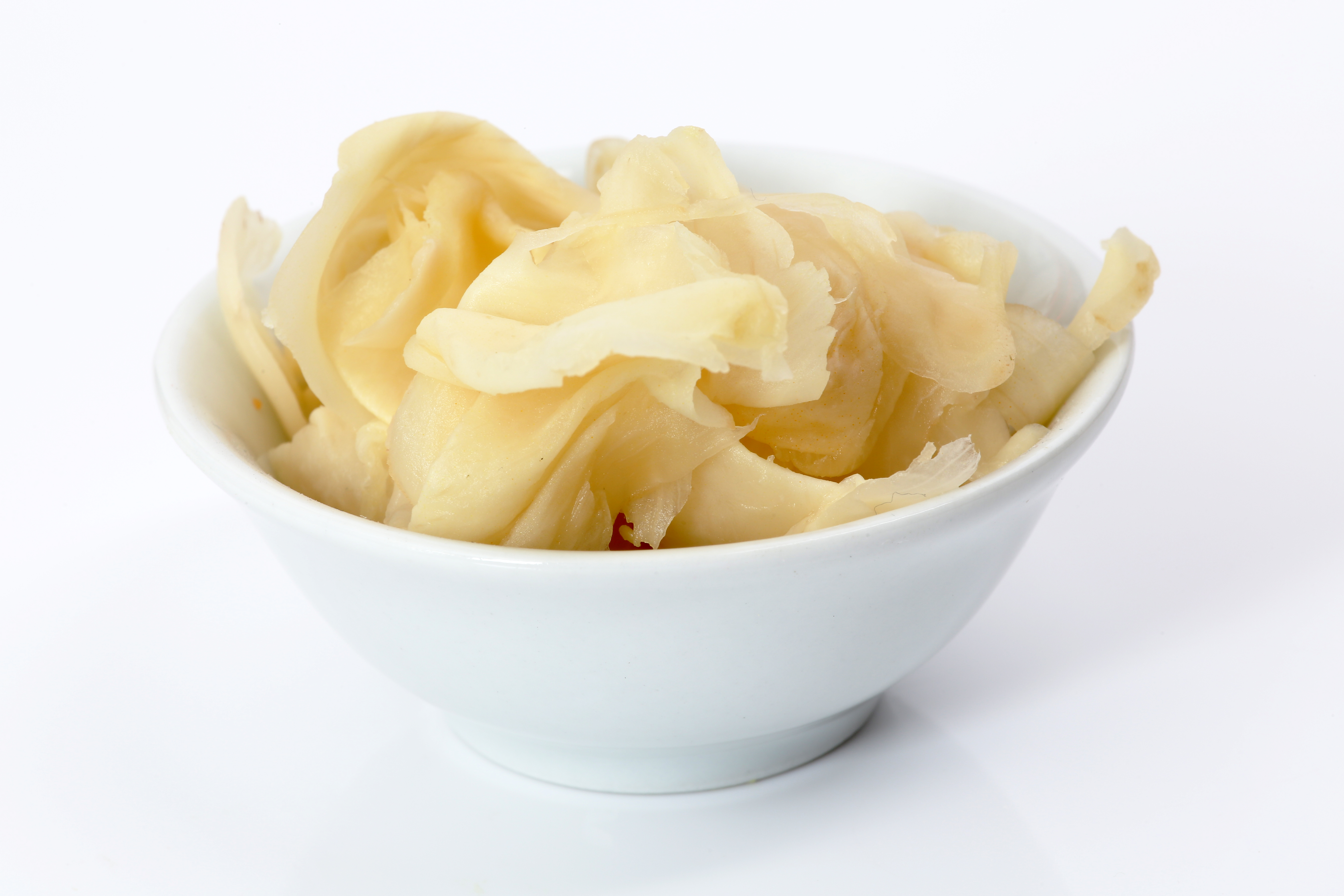 eingelegter Ingwer